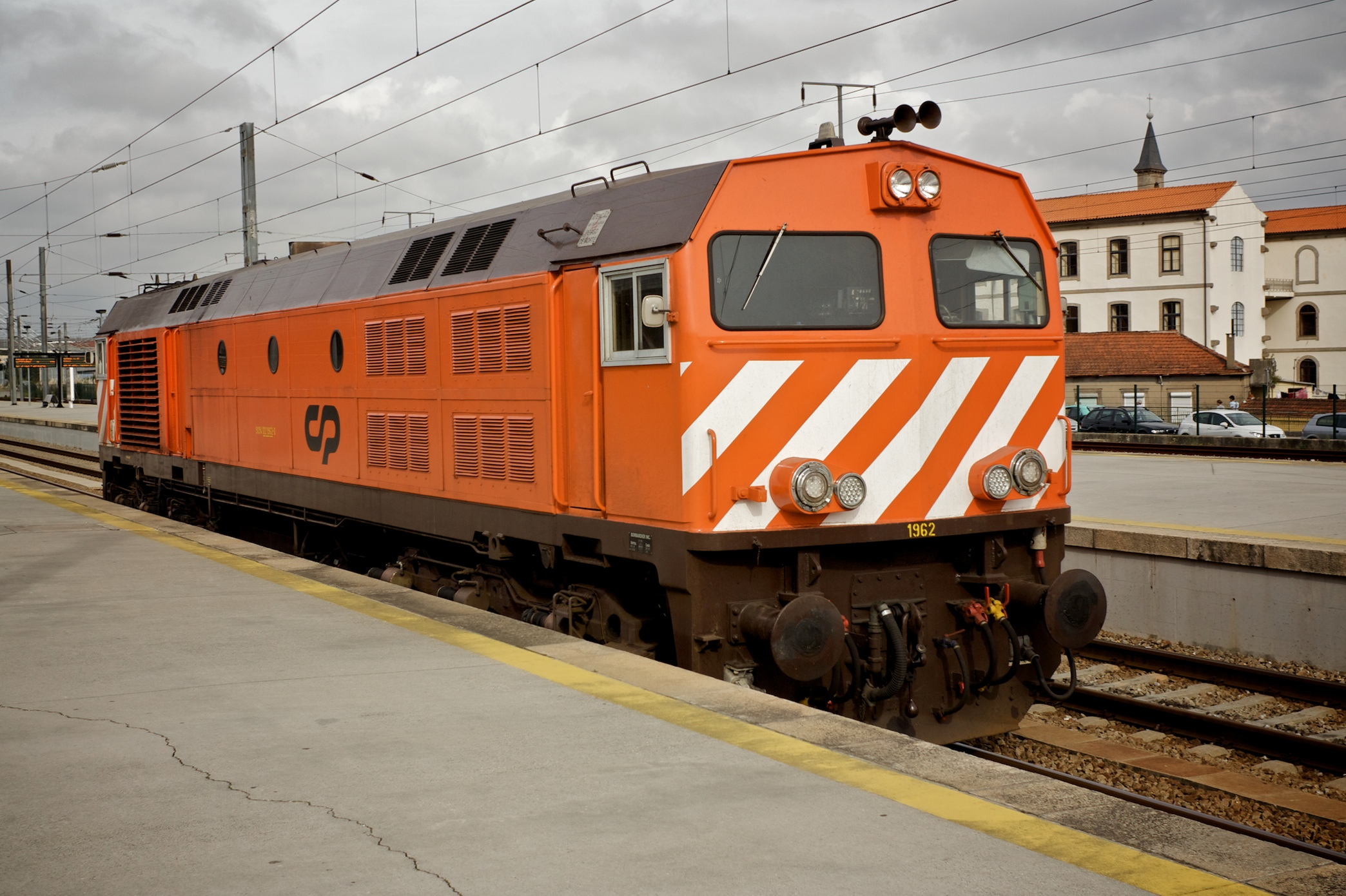 Local: Estação de Porto • Campanhã [Linha do Minho, PK 0,0 • Linha do Norte, PK 336] Data e hora: 30 de Outubro de 2009 [14h05] Material: Locomotiva 1962 [Bombardier]